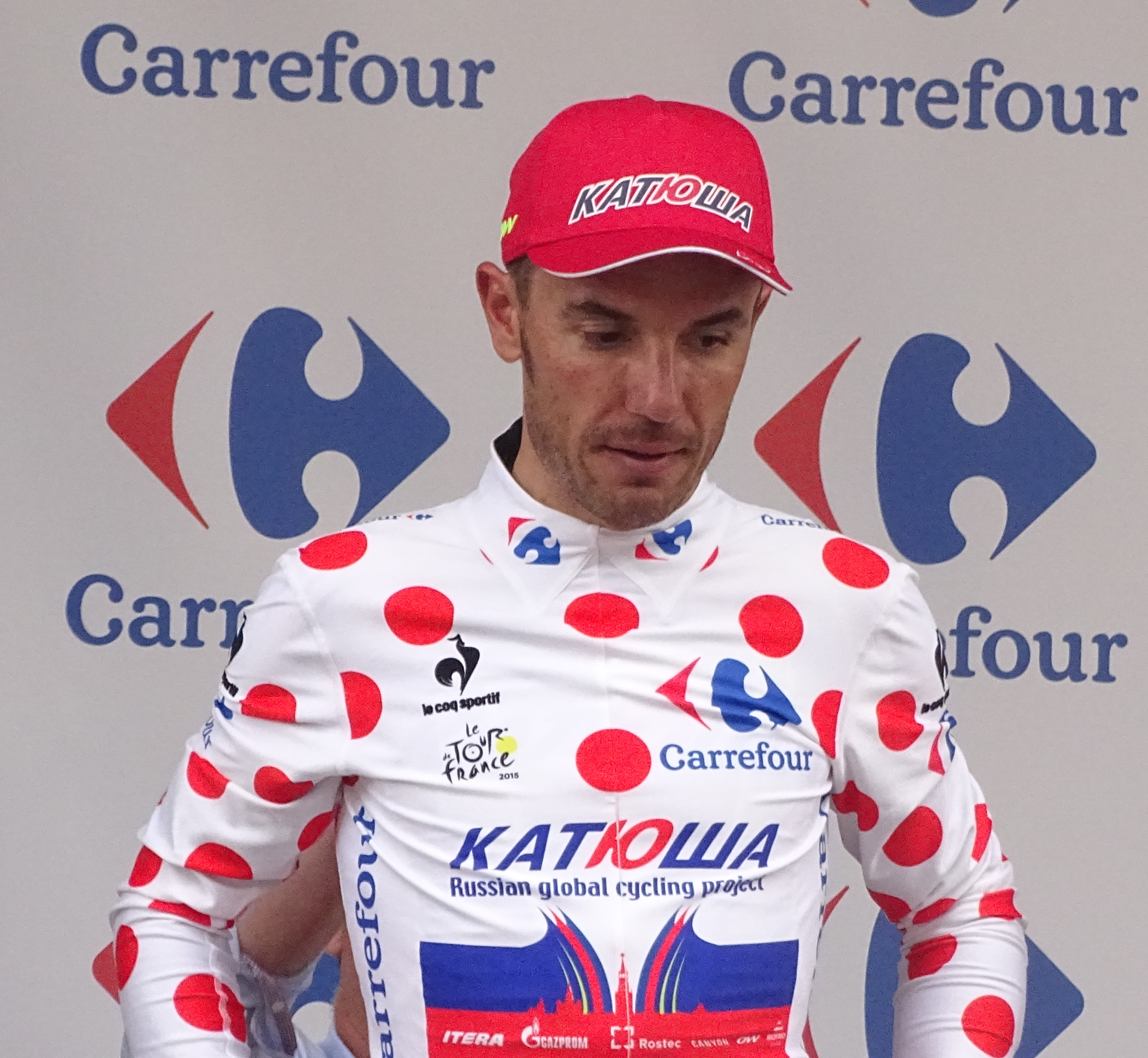 Reportage réalisé le mardi 7 juillet à l'occasion de l'arrivée de la quatrième étape du Tour de France 2015 à Cambrai, Nord-Pas-de-Calais, France.